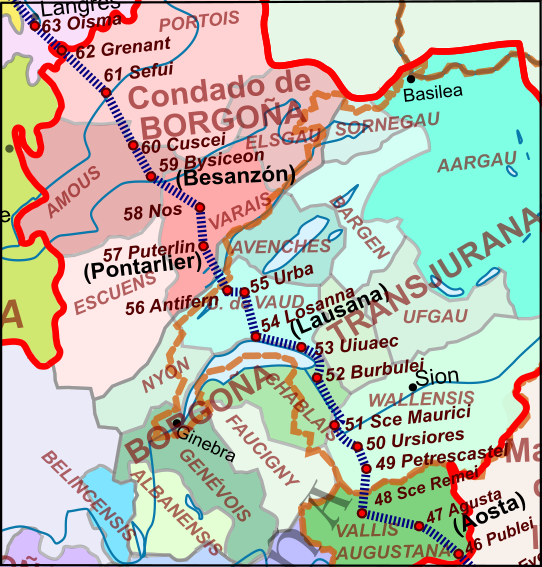 Tramo del itinerario de Sigerico en el reino de Borgoña (o Arlés)